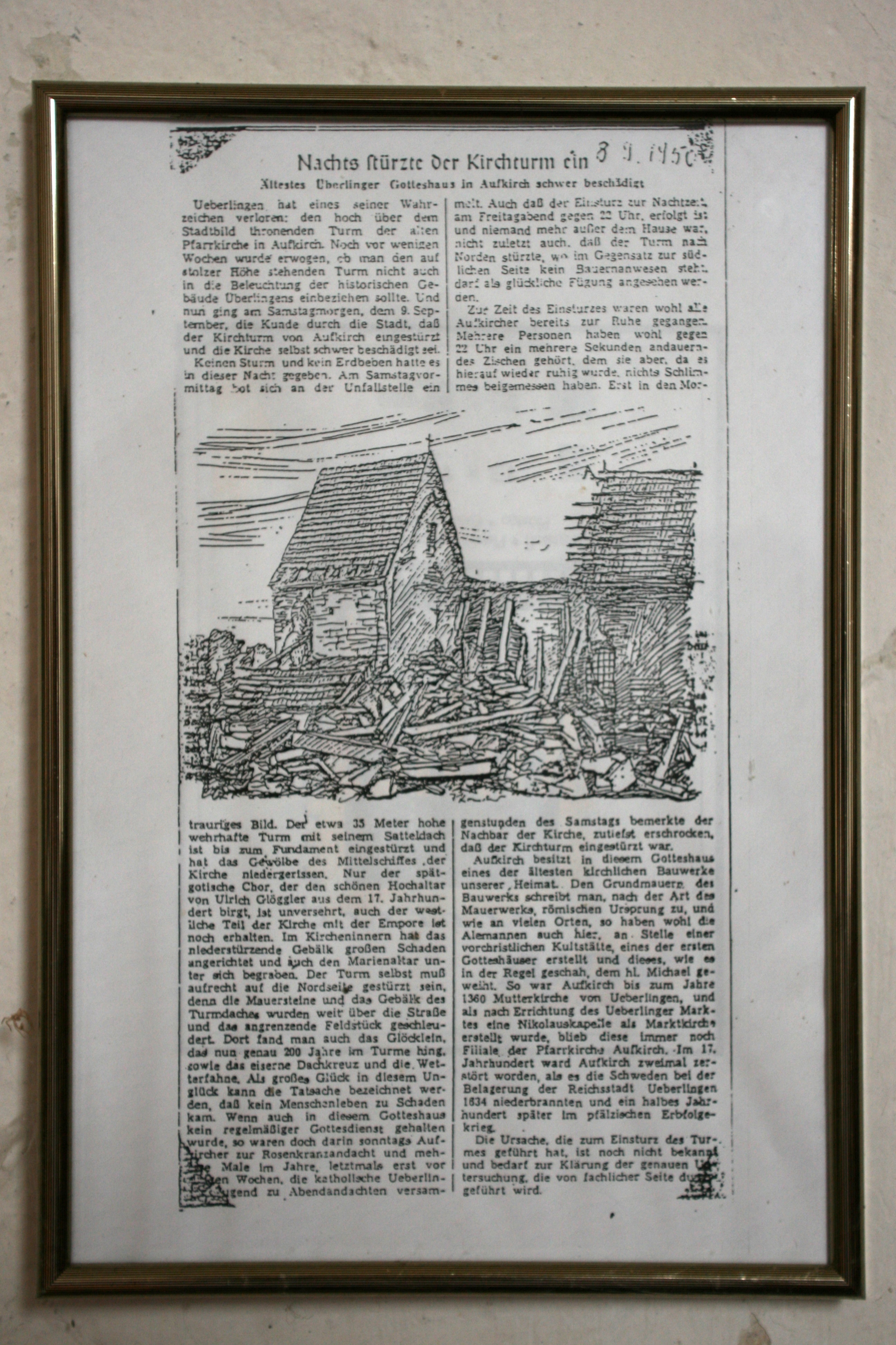 Sankt-Michael-Kirche in Aufkirch, Überlingen